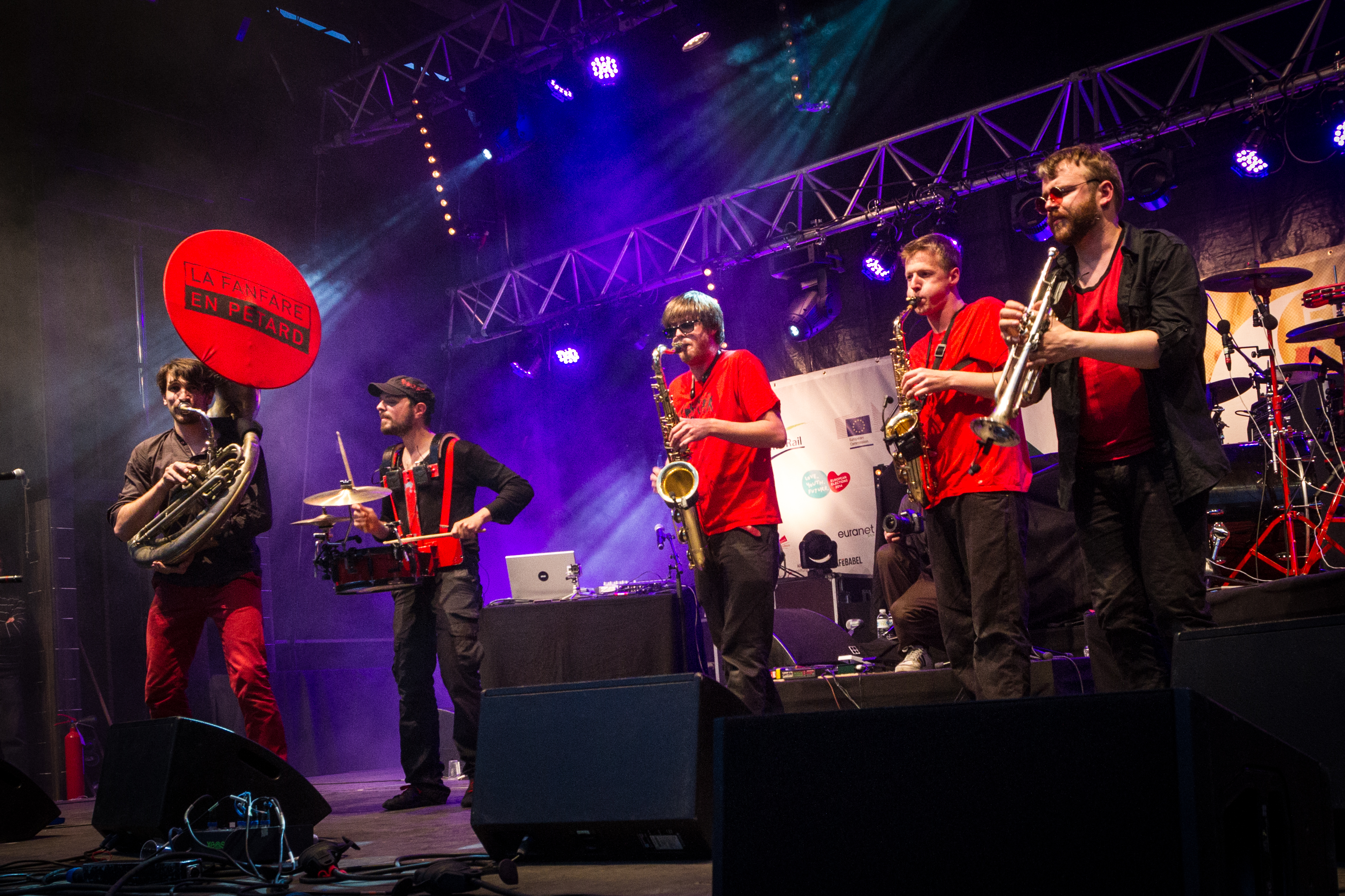 La Fanfare en Pétard à la YOFest, place Kléber à Strasbourg le 9 mai 2014.